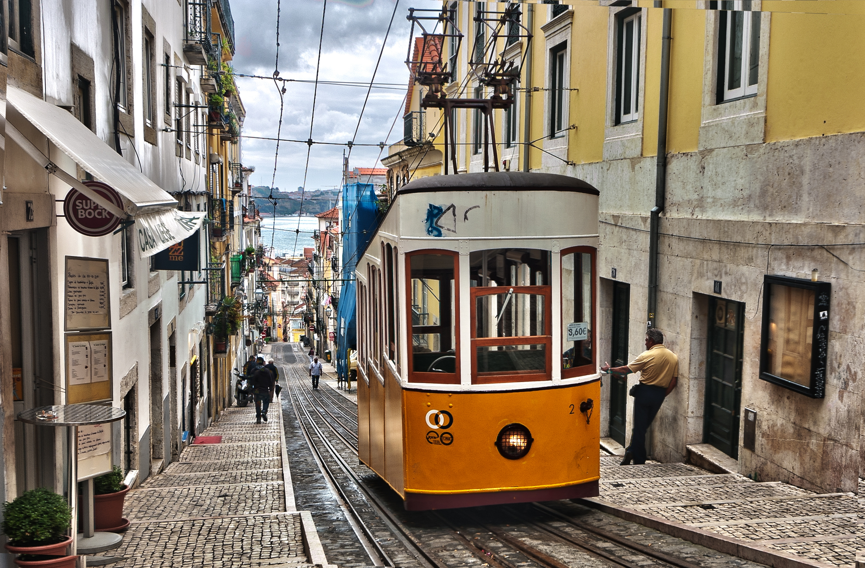 Funikulara vagono ĉe la deklivsupro.